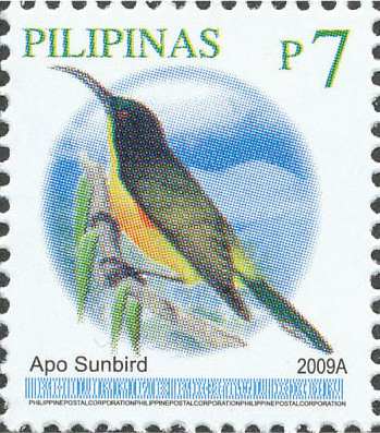 Apo Sunbird (Aethopyga boltoni)